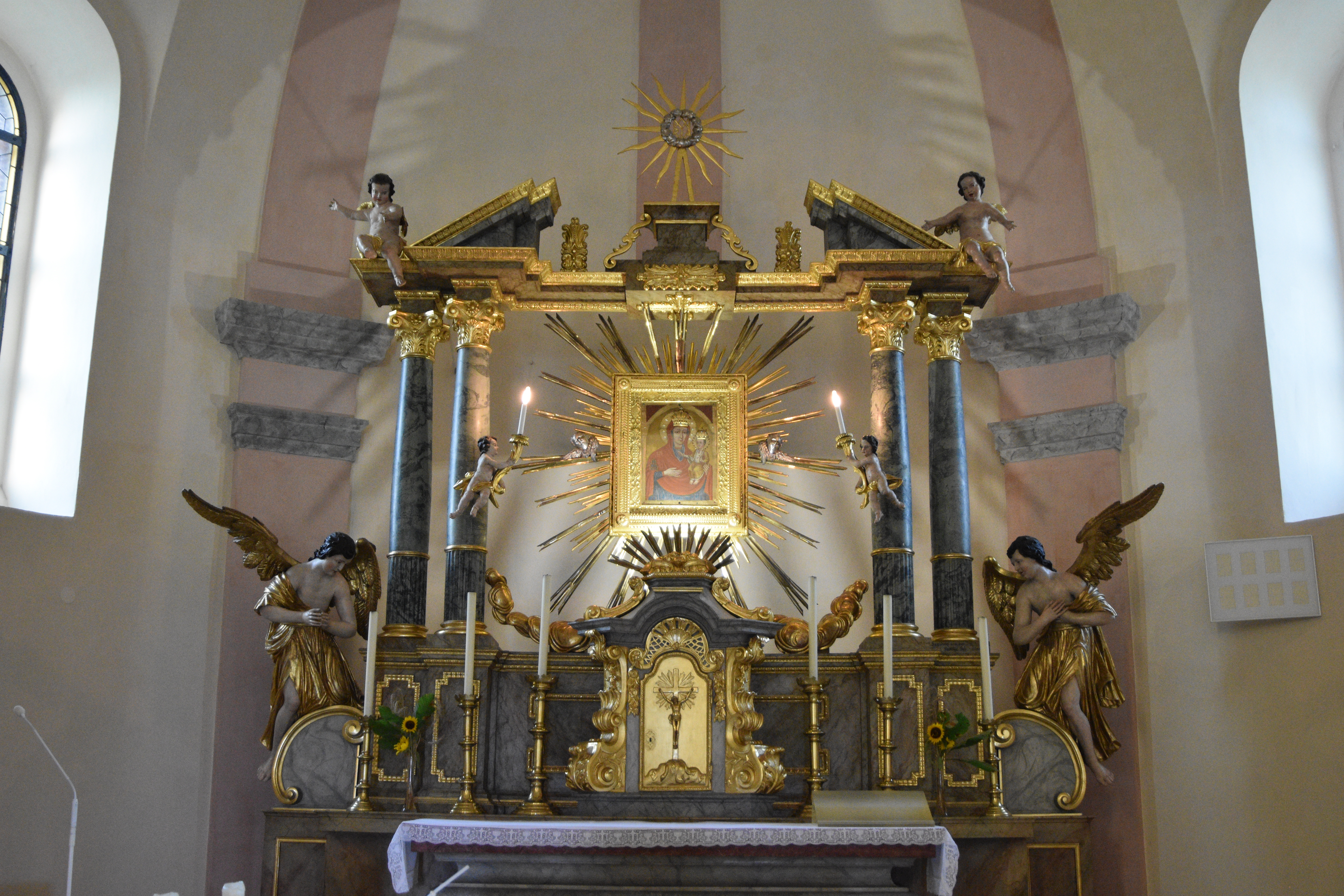 Pfarr- und Wallfahrtskirche Maria Bild Interior